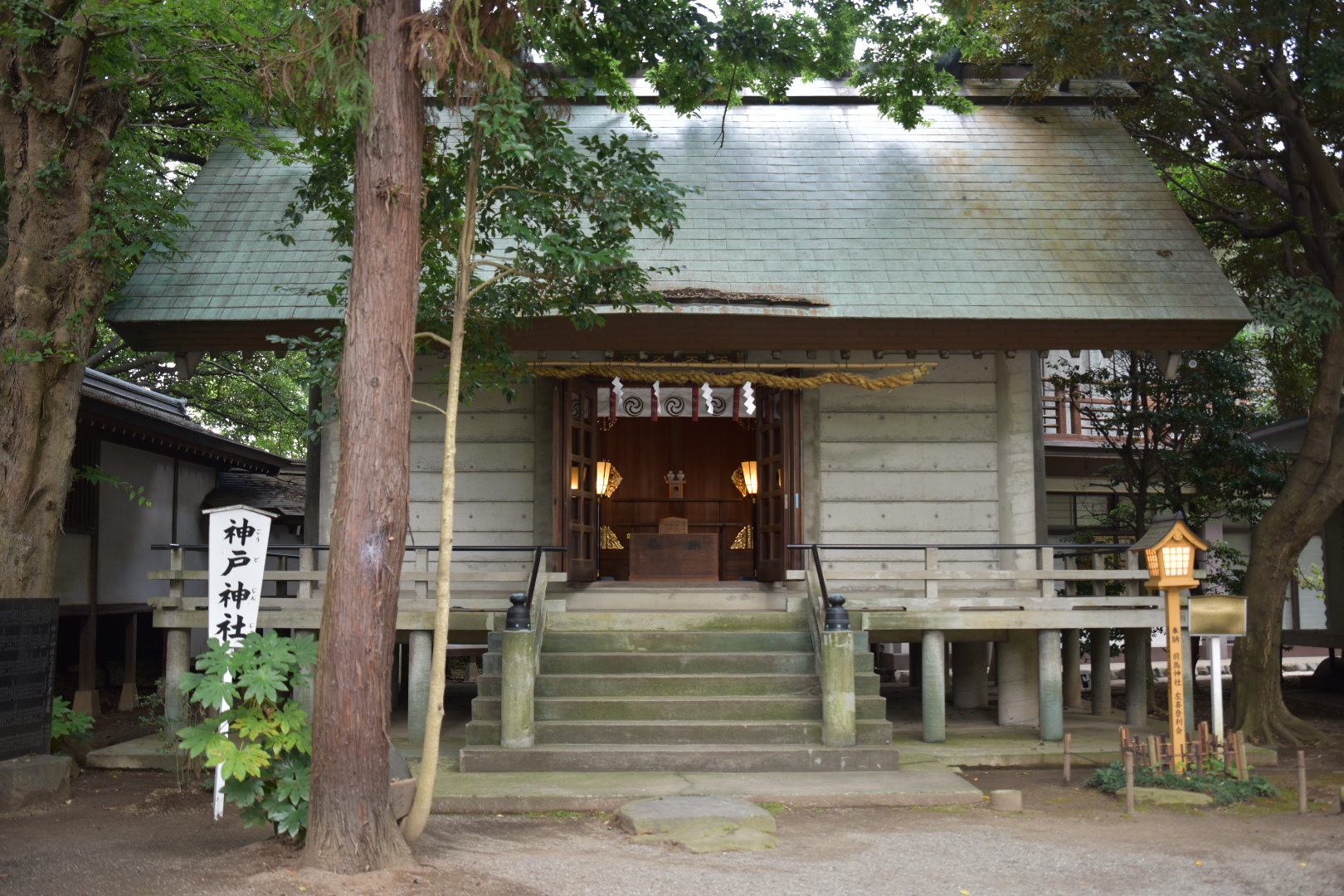 前鳥神社の境内社「神戸神社」